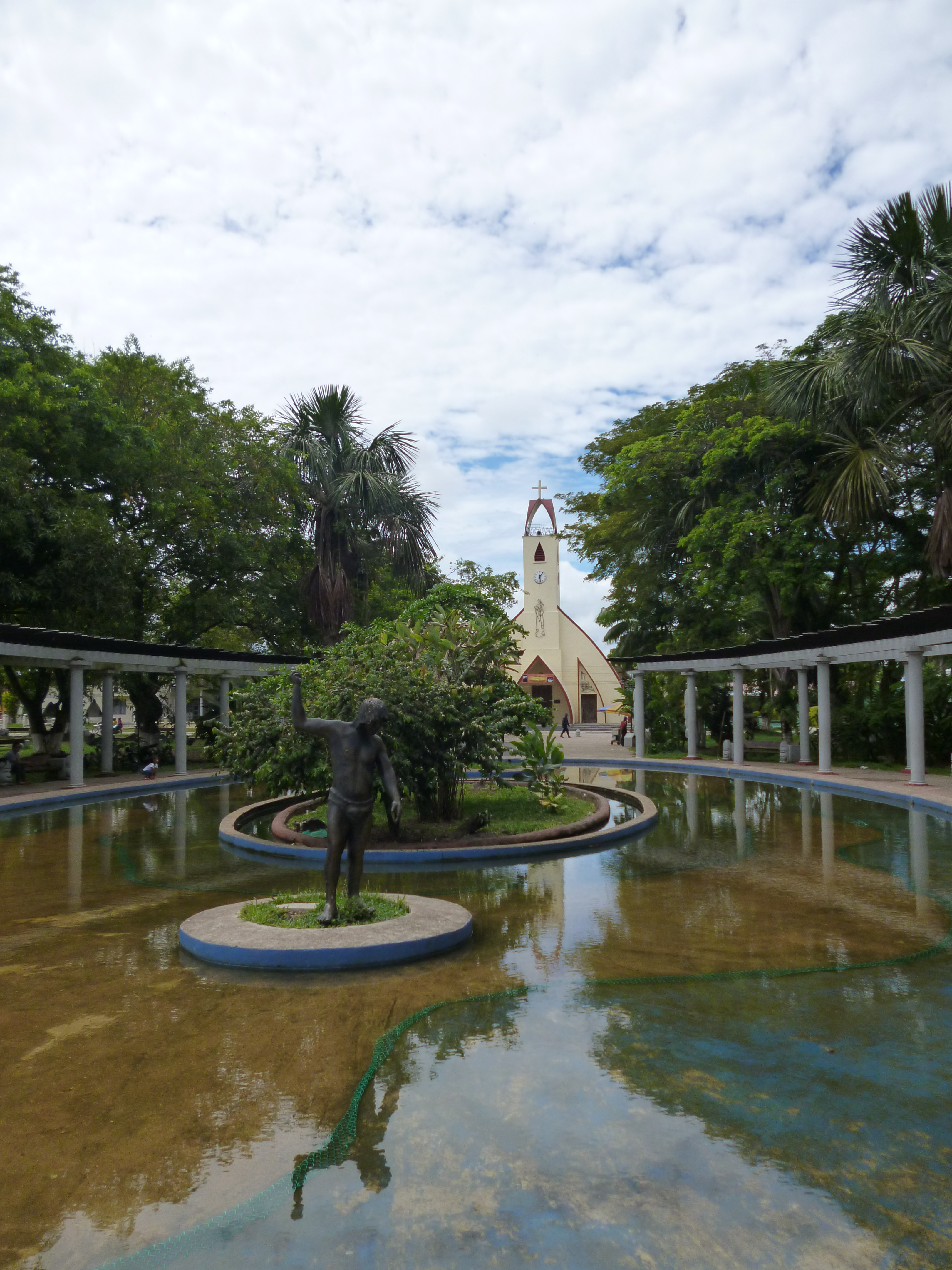 Fuente central del parque Santander, iglesia de la Paz al fondo. Leticia-Colombia